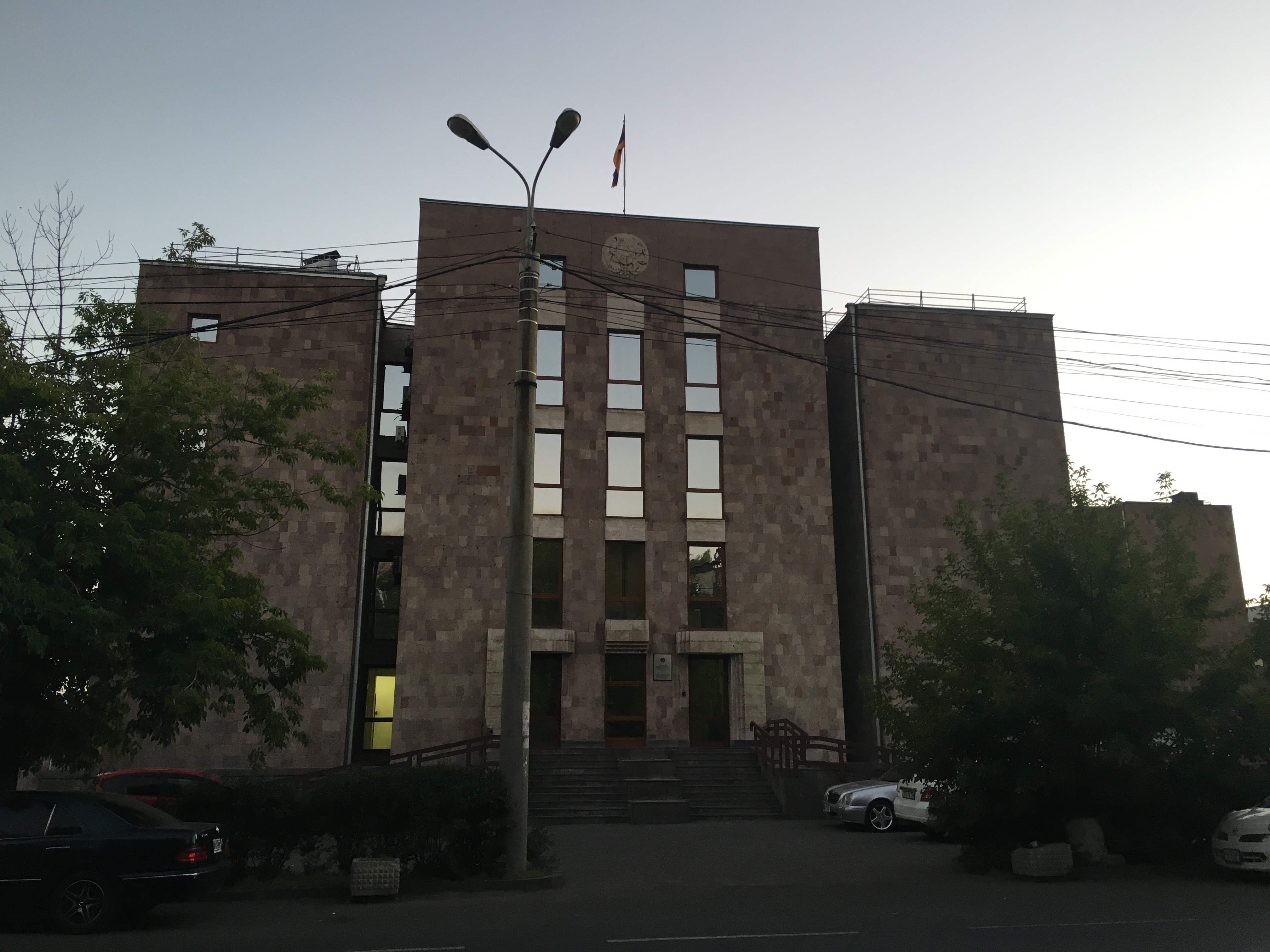 Էրեբունի և Նուբարաշեն վարչական շրջանների ընդհանուր իրավասության դատարան, Երևան, Հայաստան